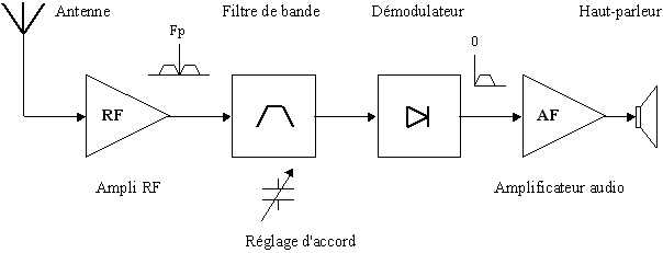 Récepteur radio à amplification directe.